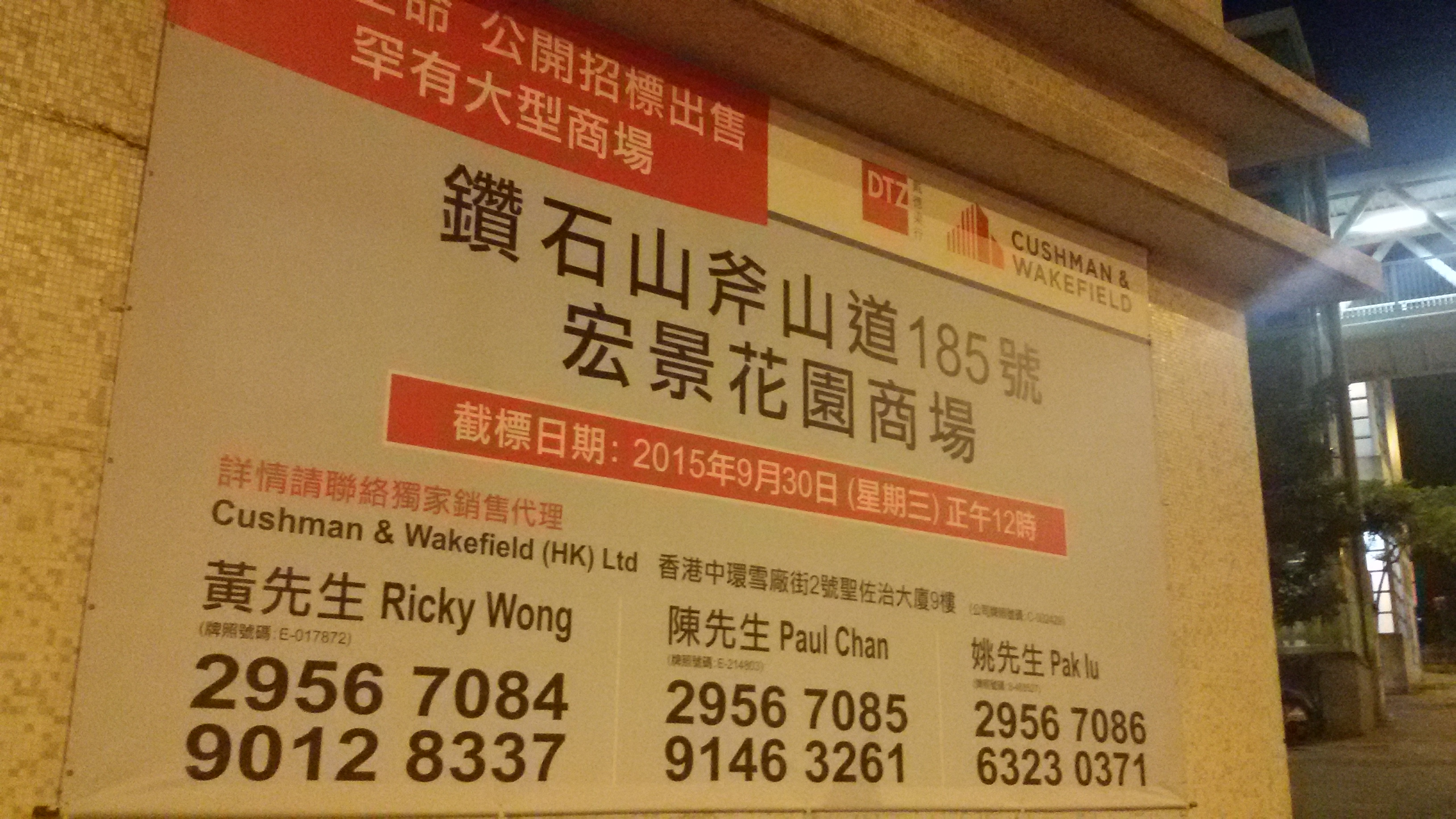 中文（香港）: 宏景花園內的商場招標